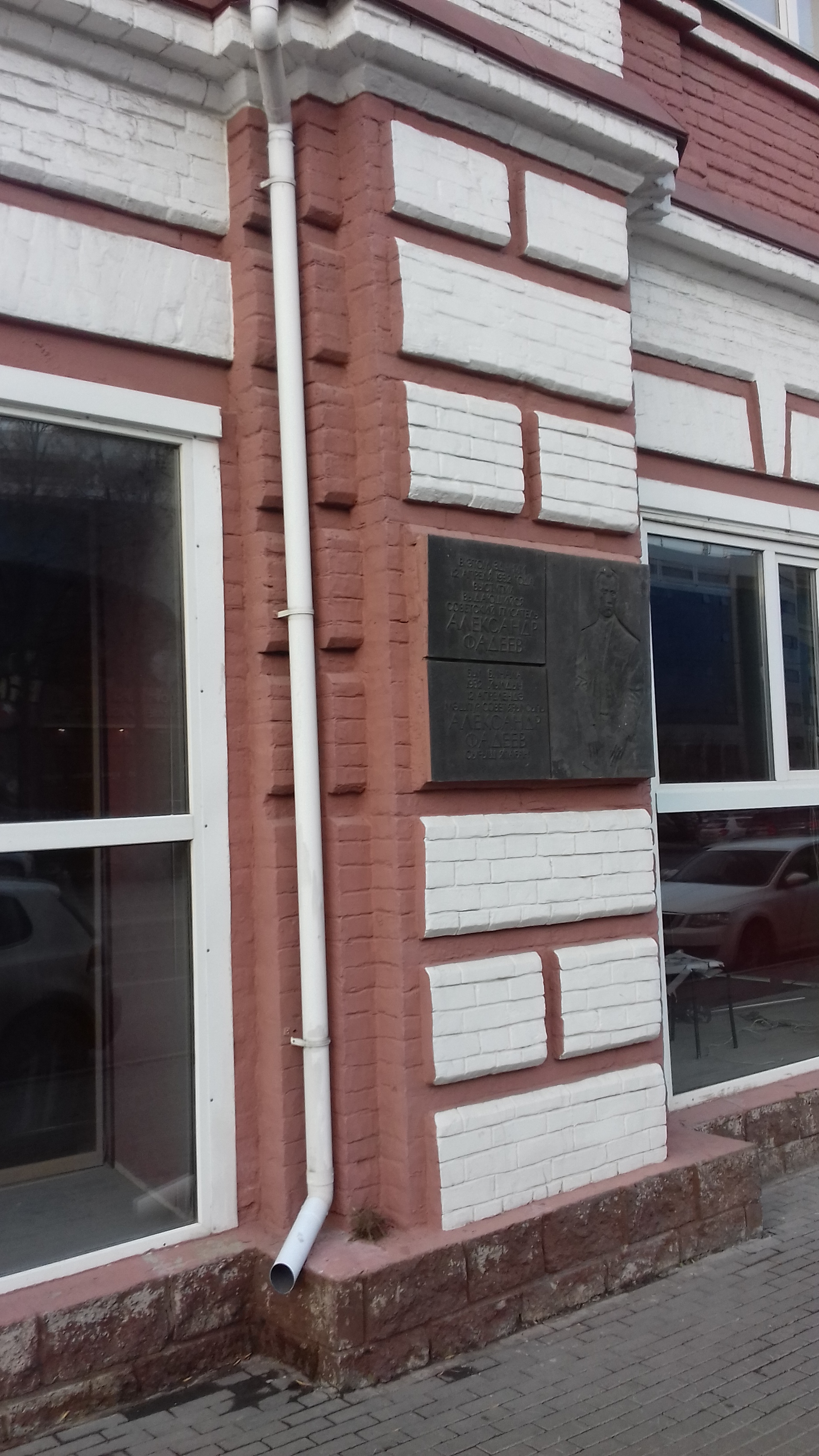 Большая сибирская гостиница: улица Карла Маркса, 14 / улица Коммунистическая, 43, Уфа, Башкортостан